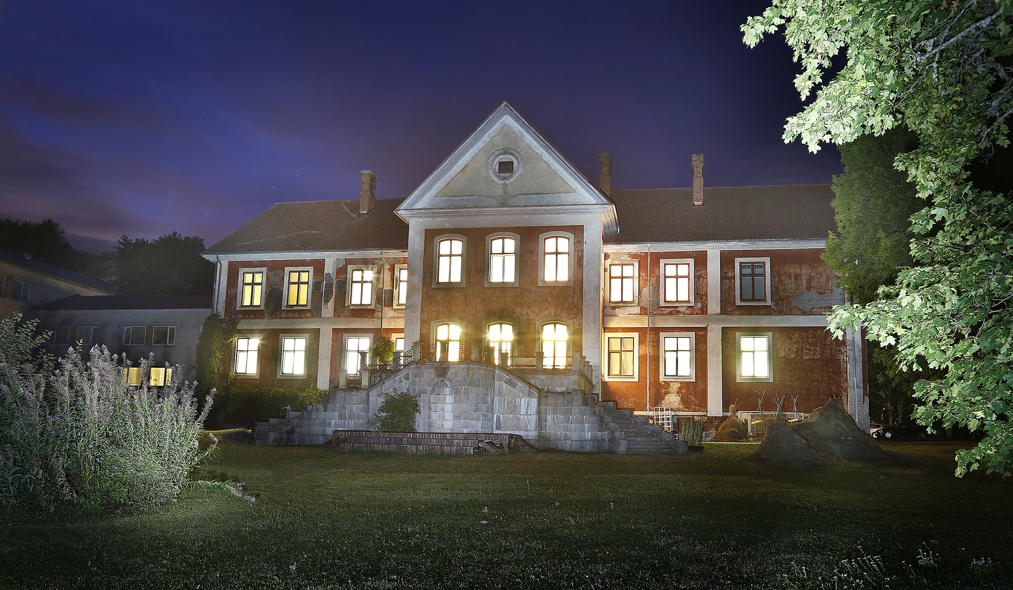 Ravila mõis öös 2018